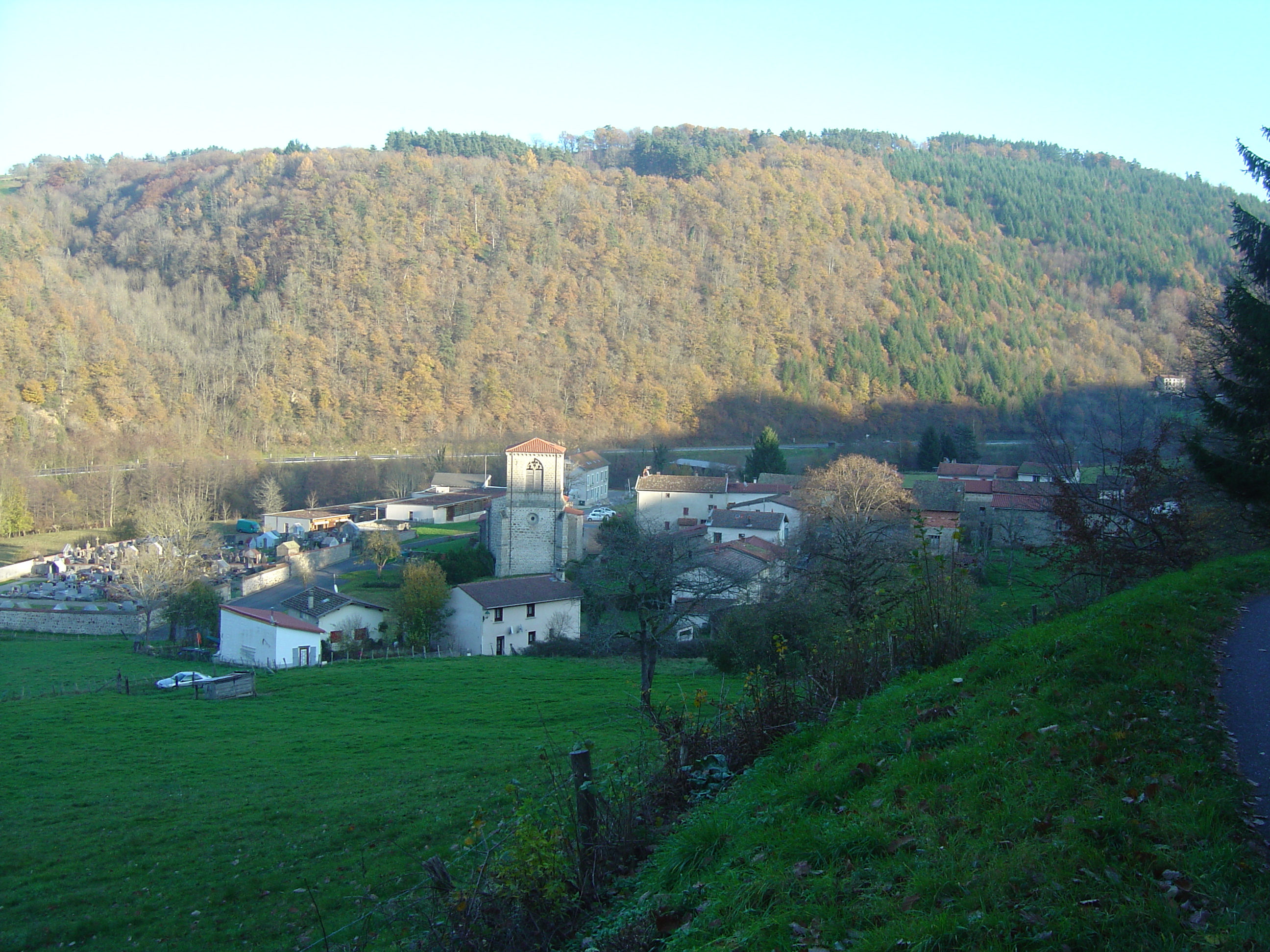 Vue générale de Saint-Gervais-sous-Meymont